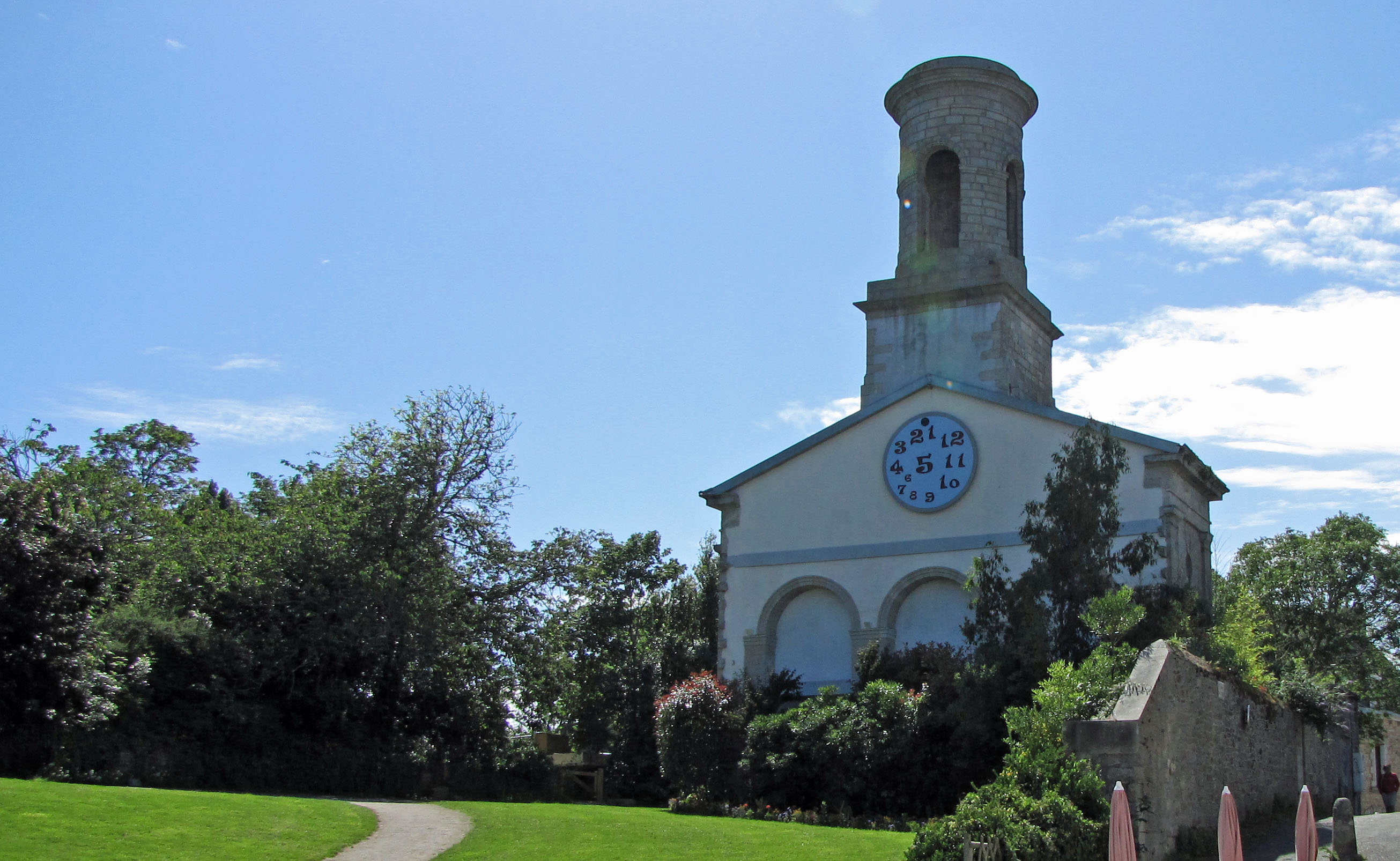 Église Saint-Guénolé de Concarneau